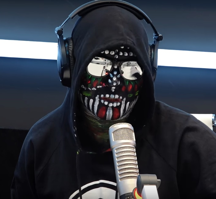 Secvență a unei vizite a lui Carla's Dreams la Virgin Radio Romania